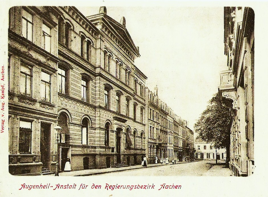 Scan einer alten Postkarte mit dem Motiv der Aachener Augenheilansalt aus dem Jahre 1888, Architekt Eduard Linse